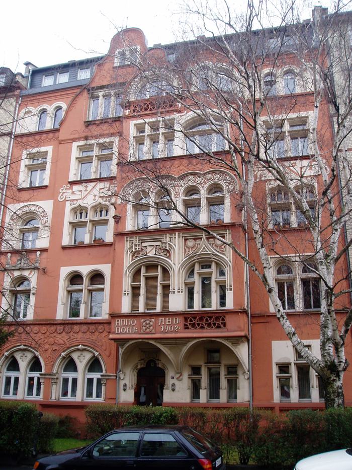 Josefsstraße 12, Mainz, vor Renovierung